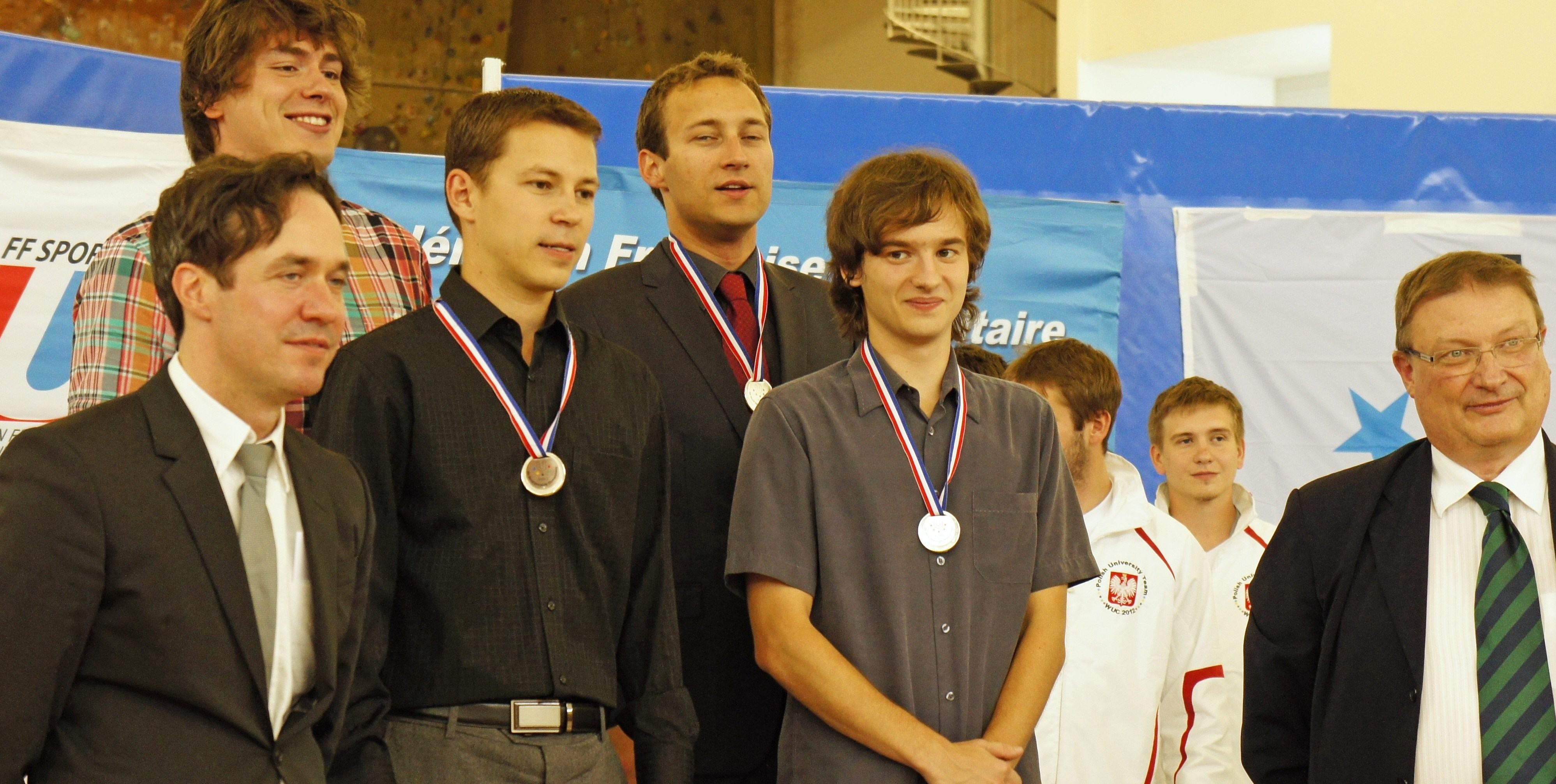 6eme championnat du monde universitaire de bridge, les seconds l'équipe de la République Tchèque.